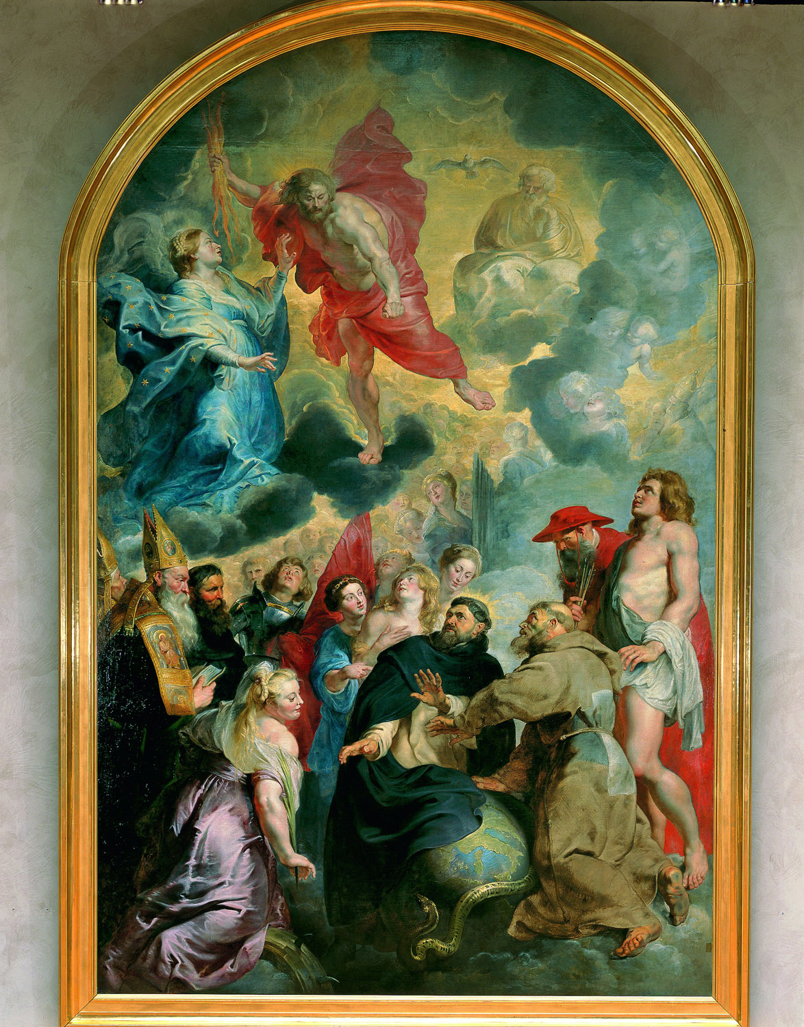 Pierre-Paul Rubens, Saint Dominique et saint François préservant le monde de la colère du Christ (vers 1618-1620), huile sur toile, 565 cm x 365 cm, Lyon, musée des Beaux-Arts